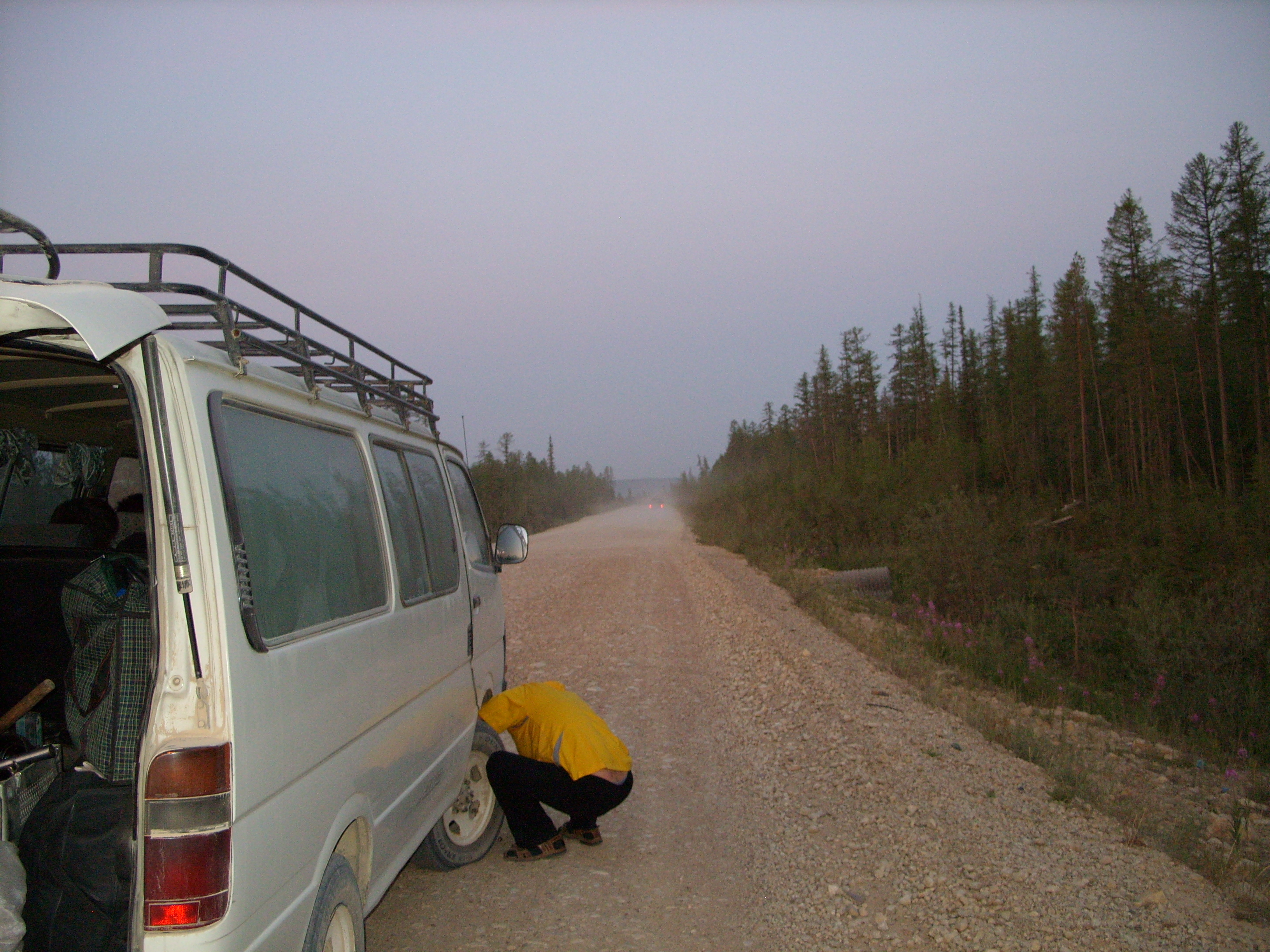 На участке Качикатцы — Мундуруччу. Снимок июля 2008 г.